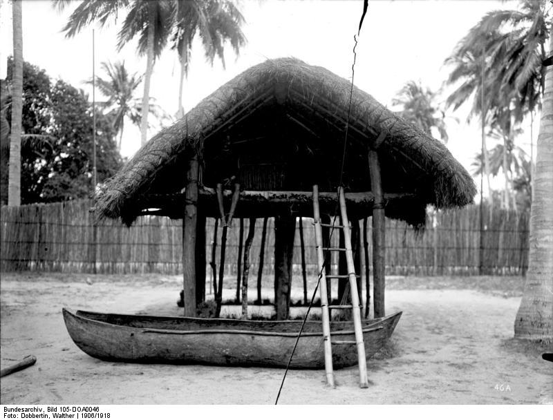 Pfahlhütte im Wasser des Rufidji Ulanga, Ausstellung